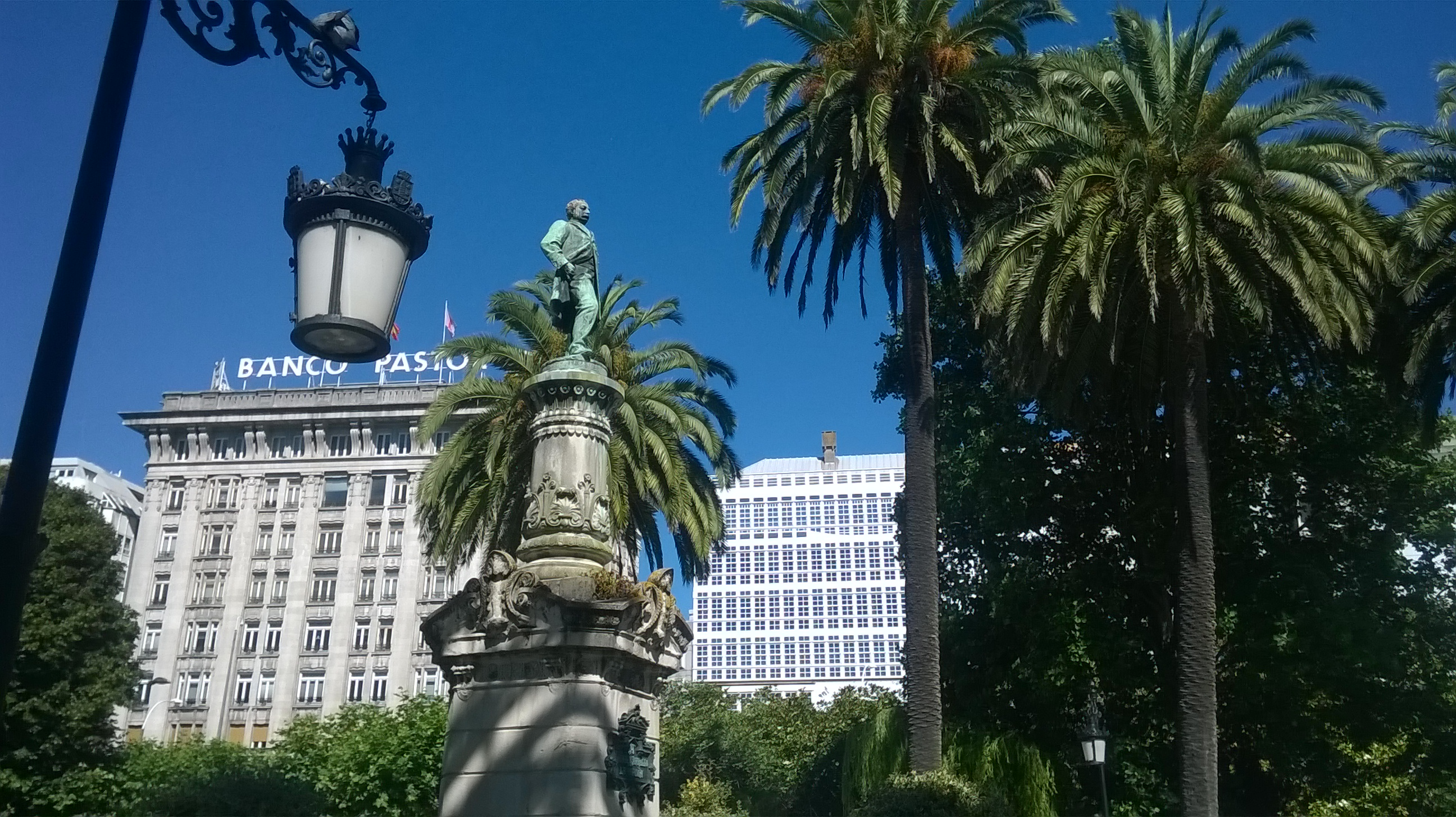 Es un conocido edificio de la ciudad situado en el Cantón Pequeño.